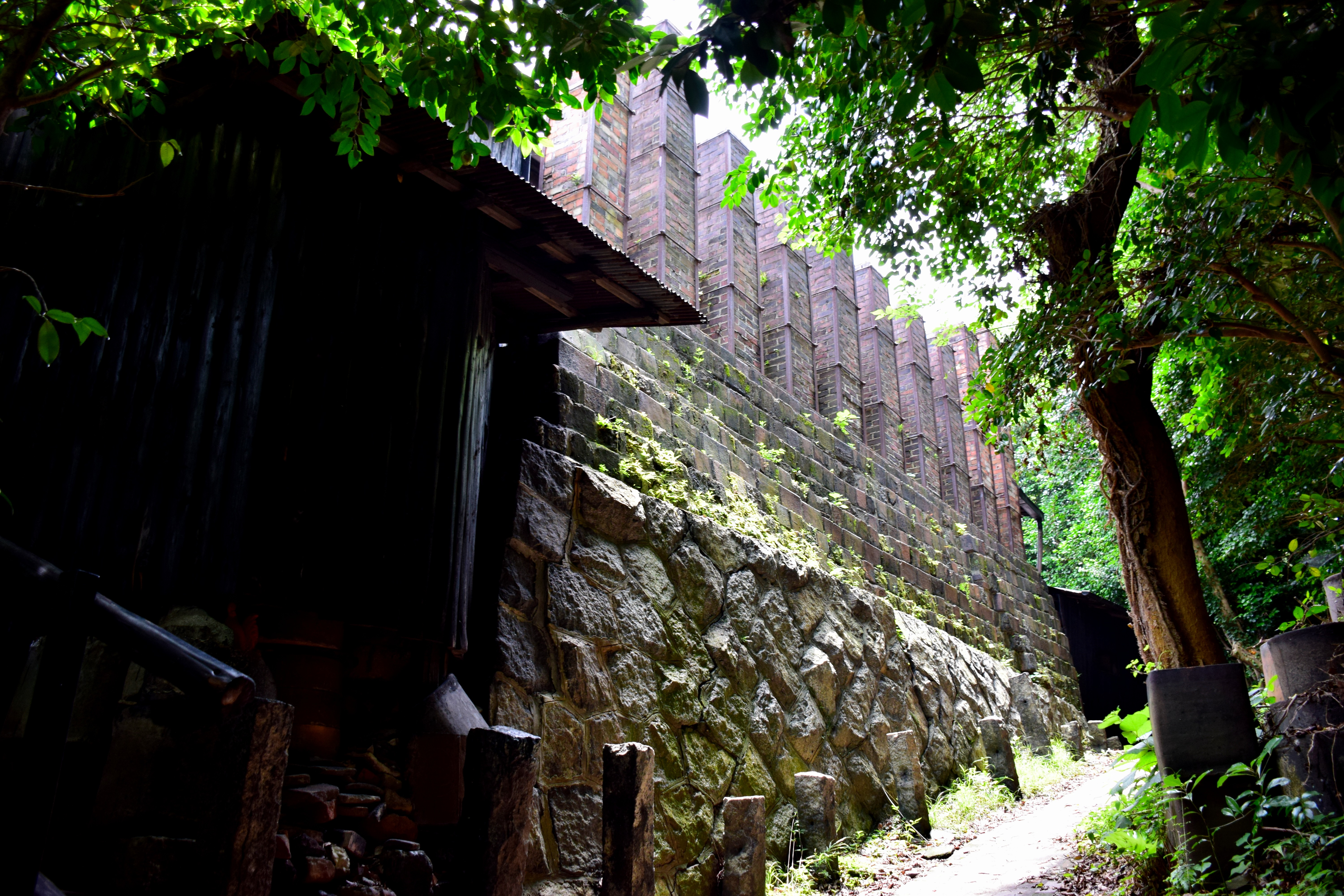 やきもの散歩道（陶栄窯）